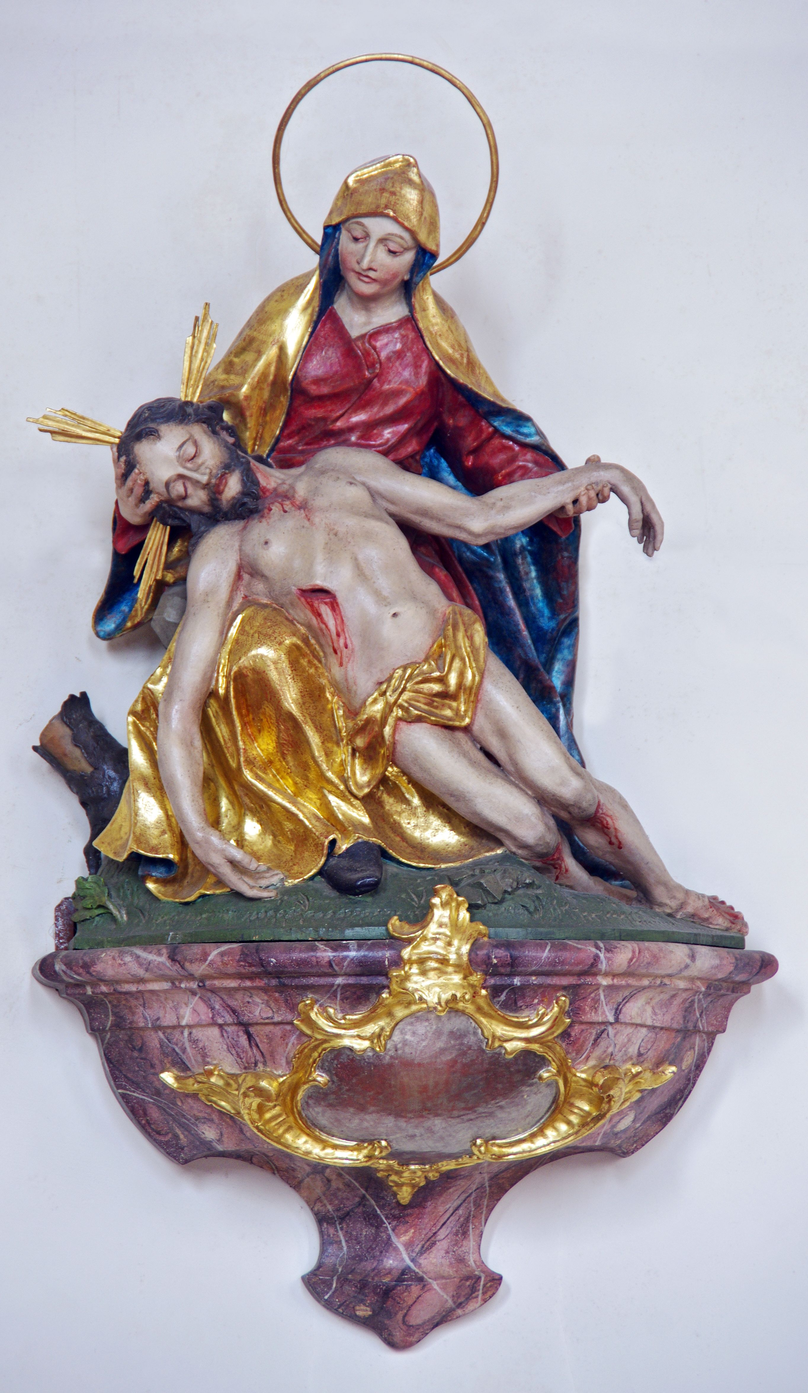 Die katholische Kirche St. Jakobus in Stegen-Eschbach